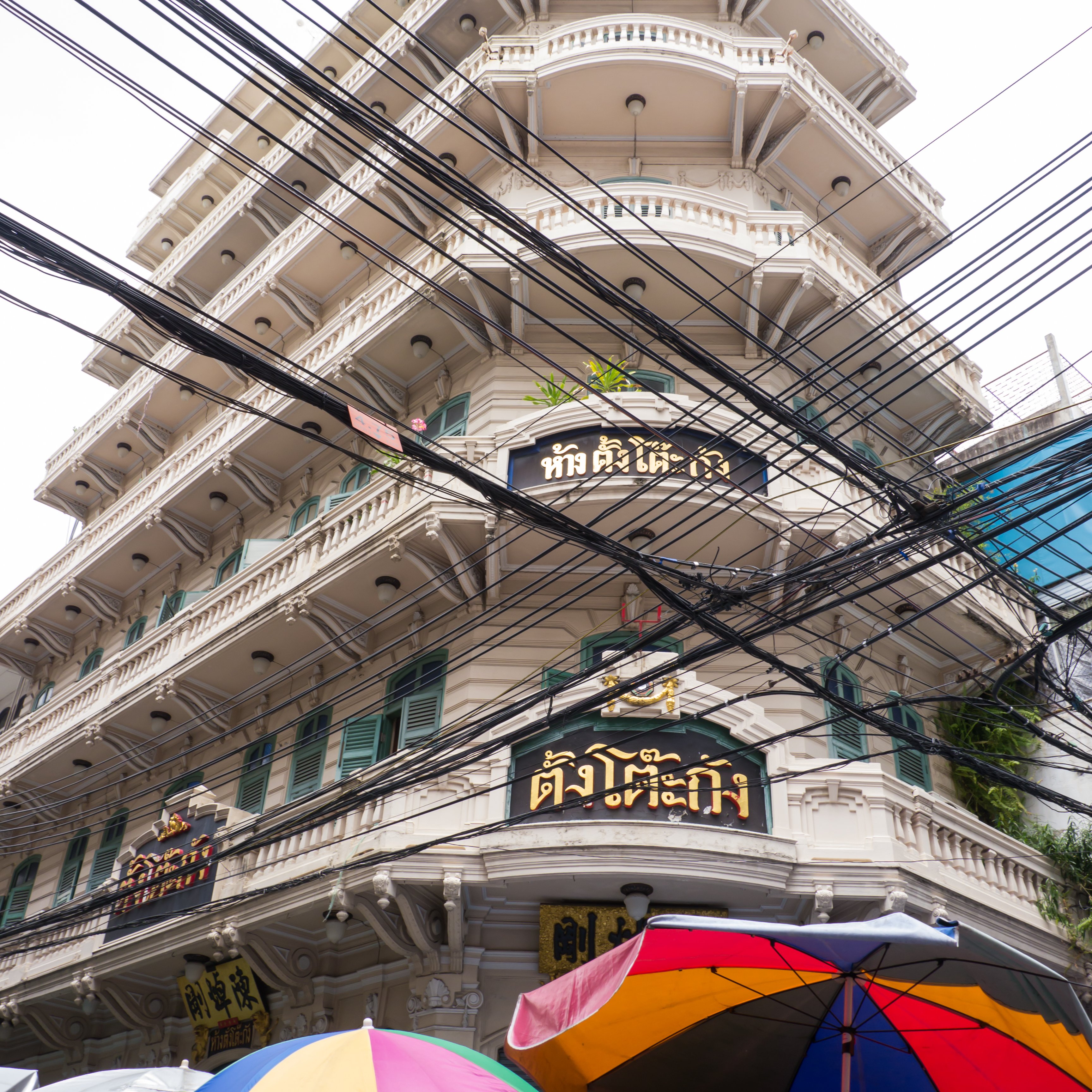 ห้างทองตั้งโต๊ะกัง